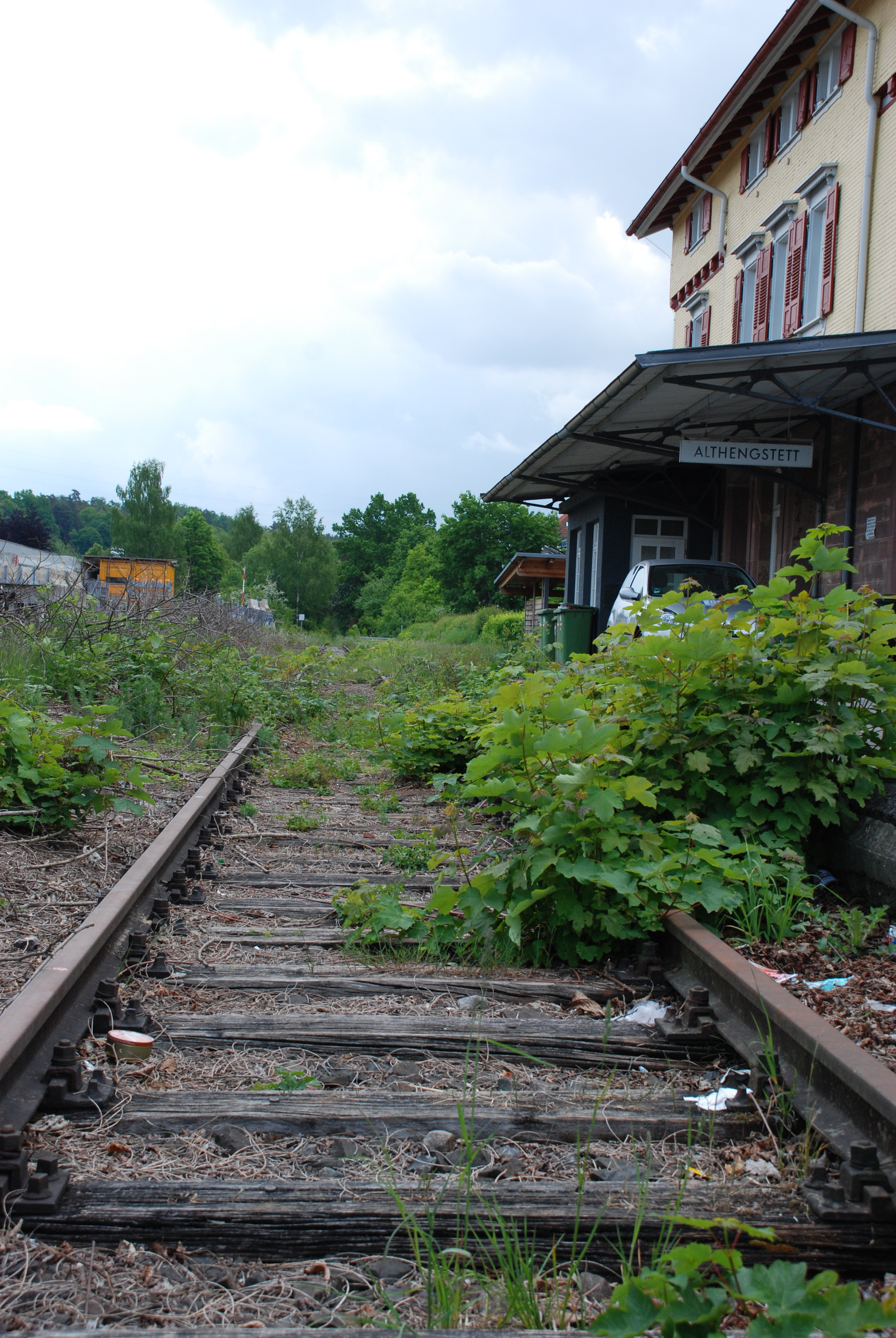 Bahnhof Althengstett Bahngeleis der Schwarzwaldbahn in Richtung Weil der Stadt